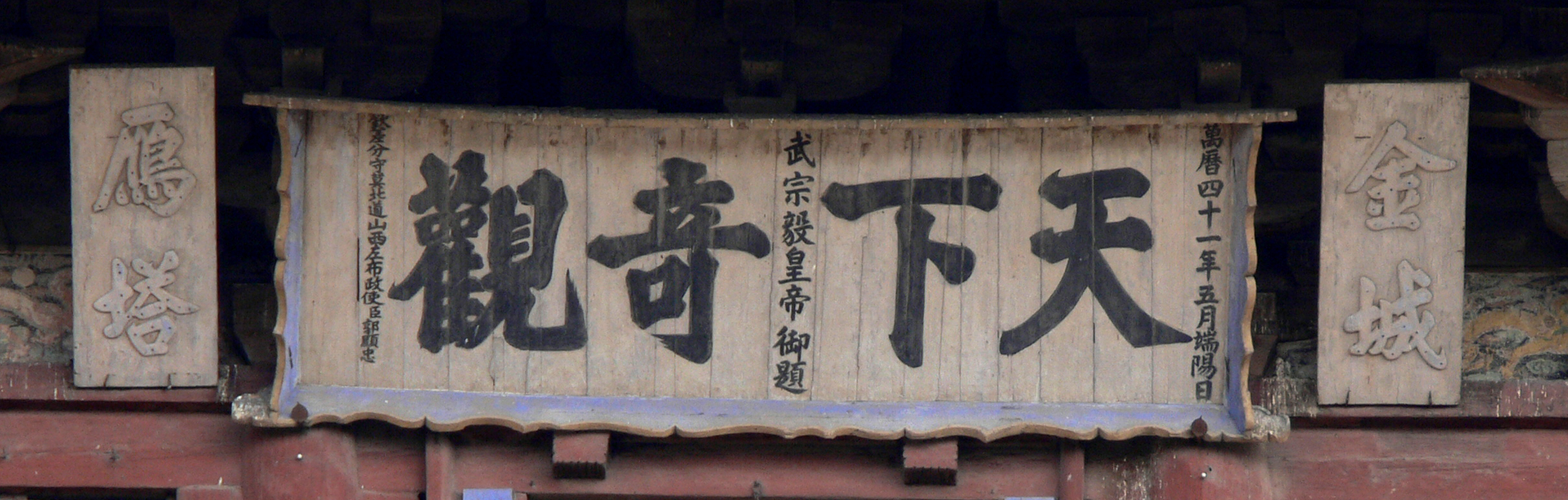 山西应县木塔明万历匾额